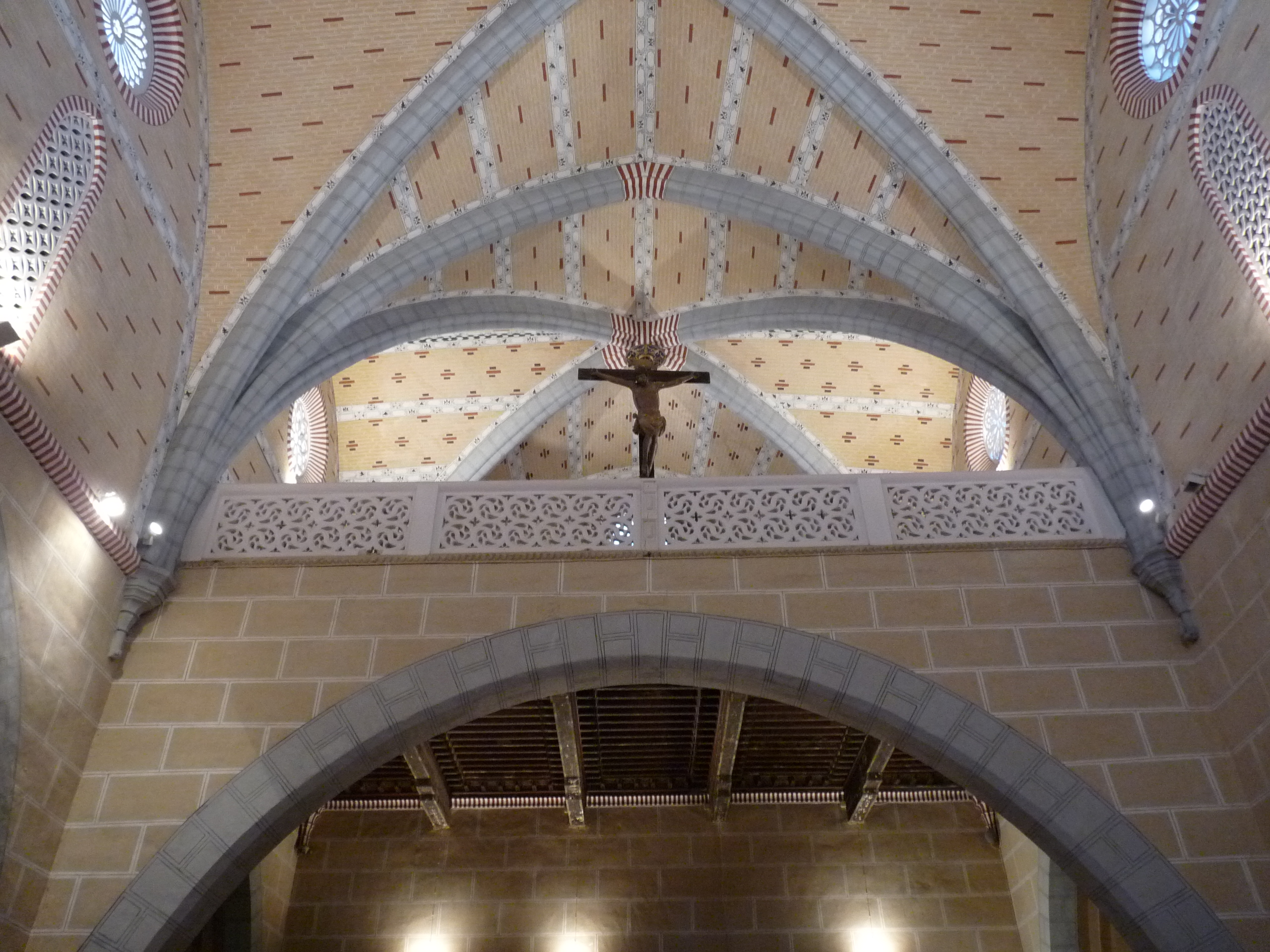 Maluenda - Iglesia de Santa Maria - Coro